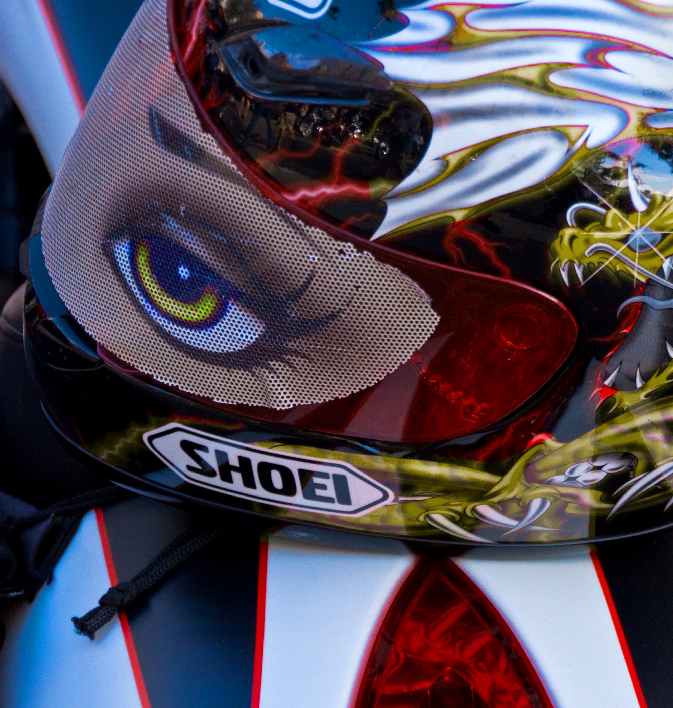 helmet